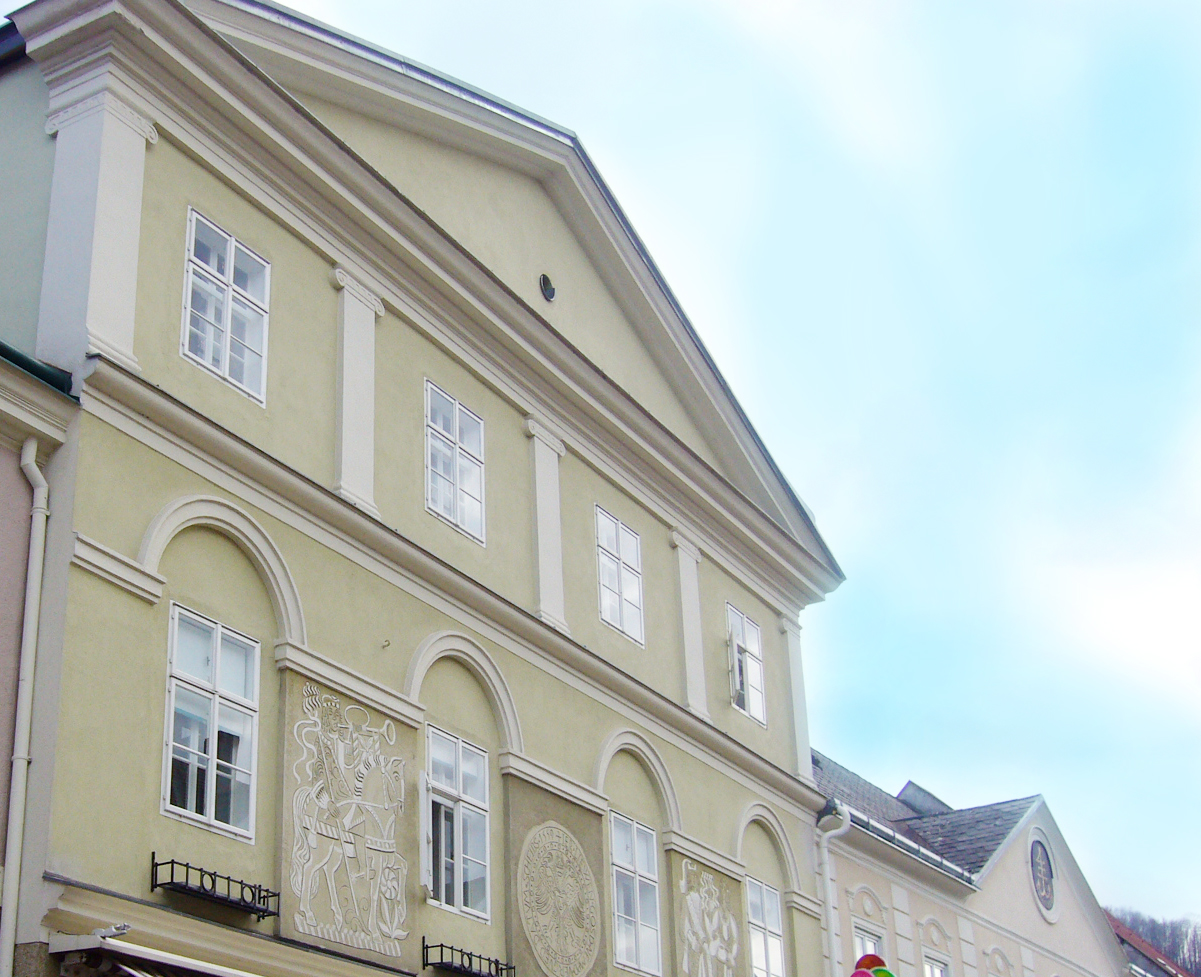 haus scheibbs